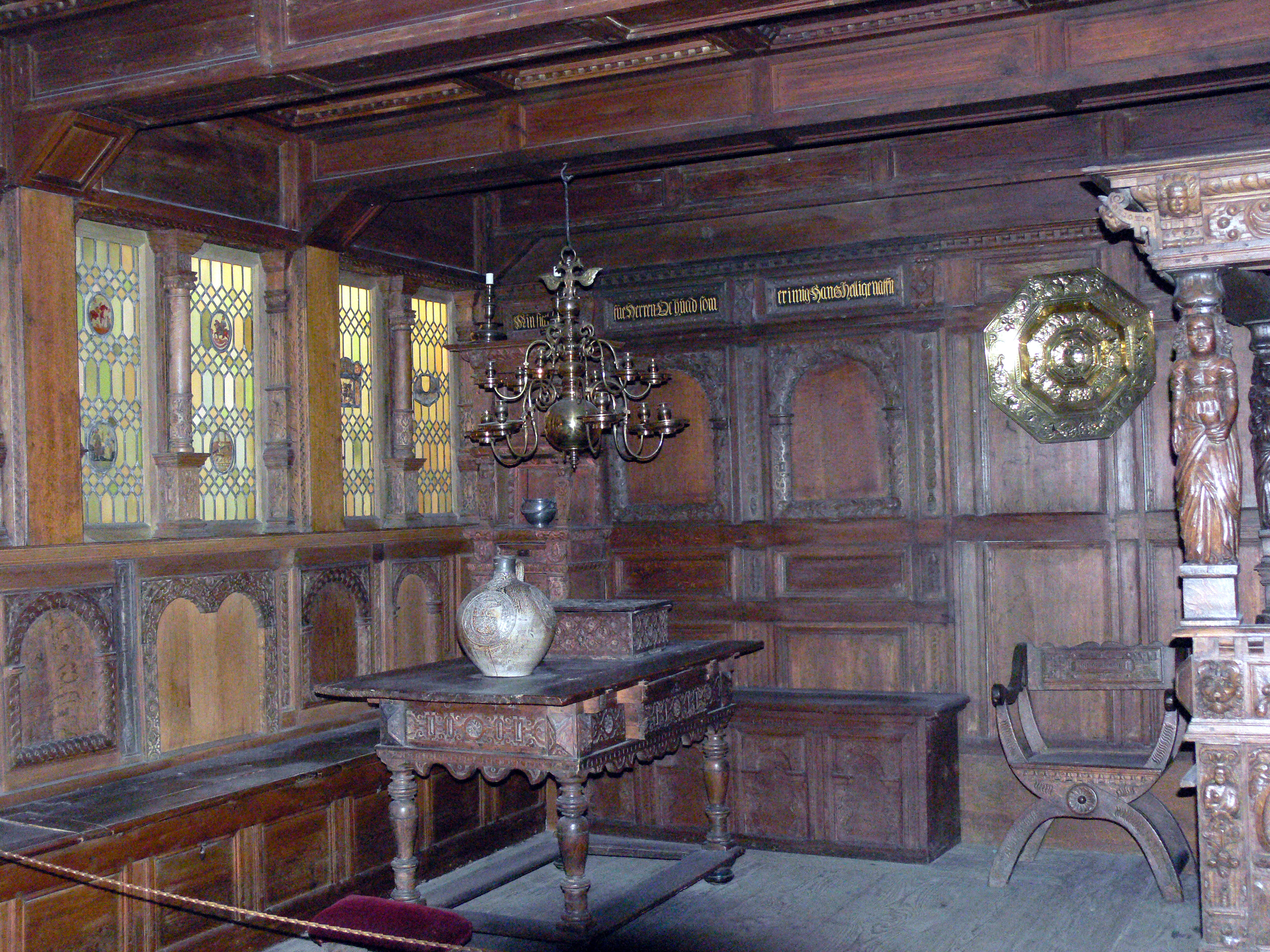 Ålborgstuen. Bürgerzimmer aus der Zeit zwischen 1600 und 1660. Nationalmuseum Kopenhagen.